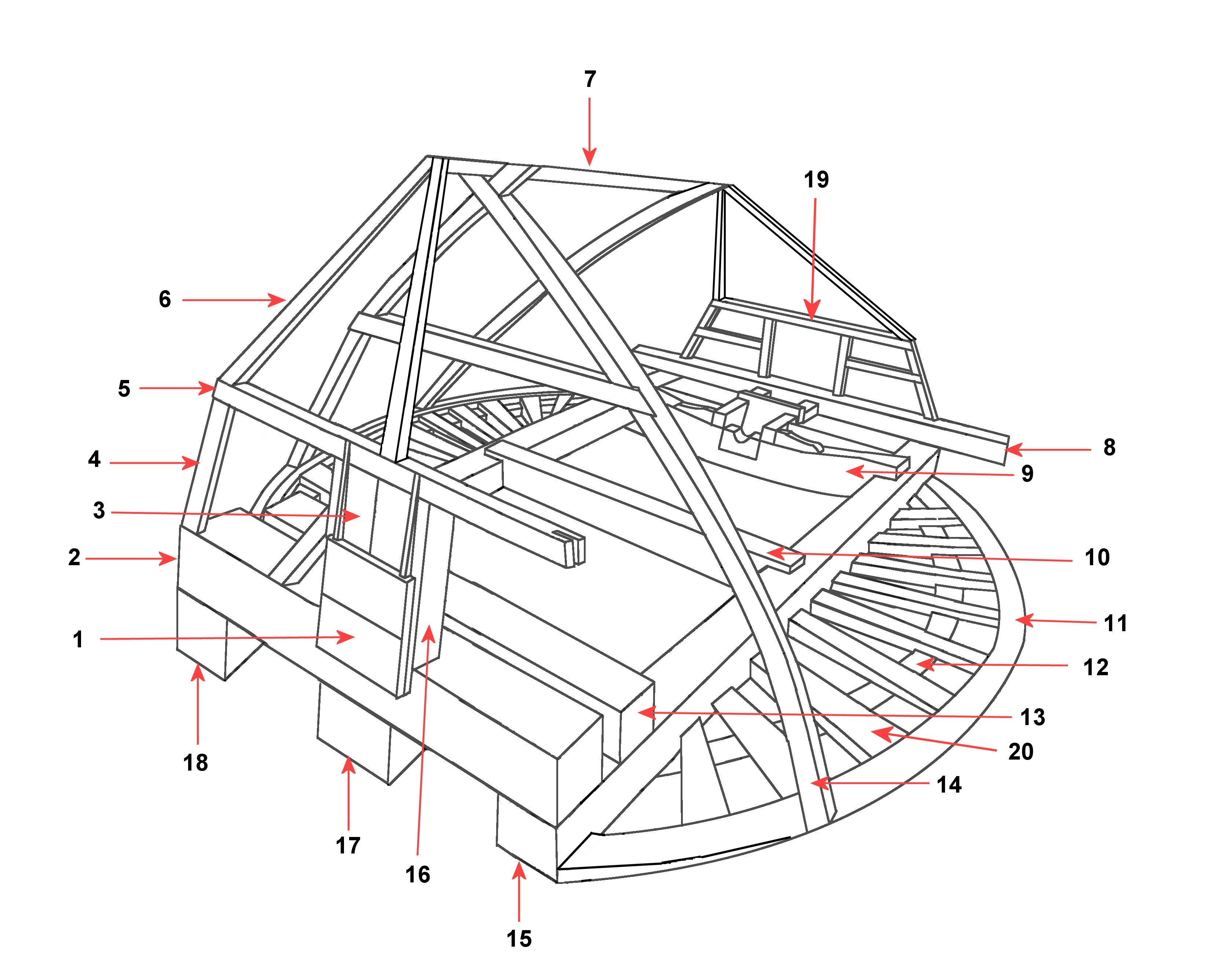 Kap van een bovenkruier